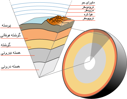 این نسخه نسخه فارسی پرونده زیر است